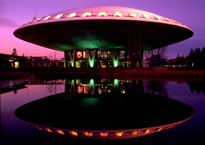 Evoluon